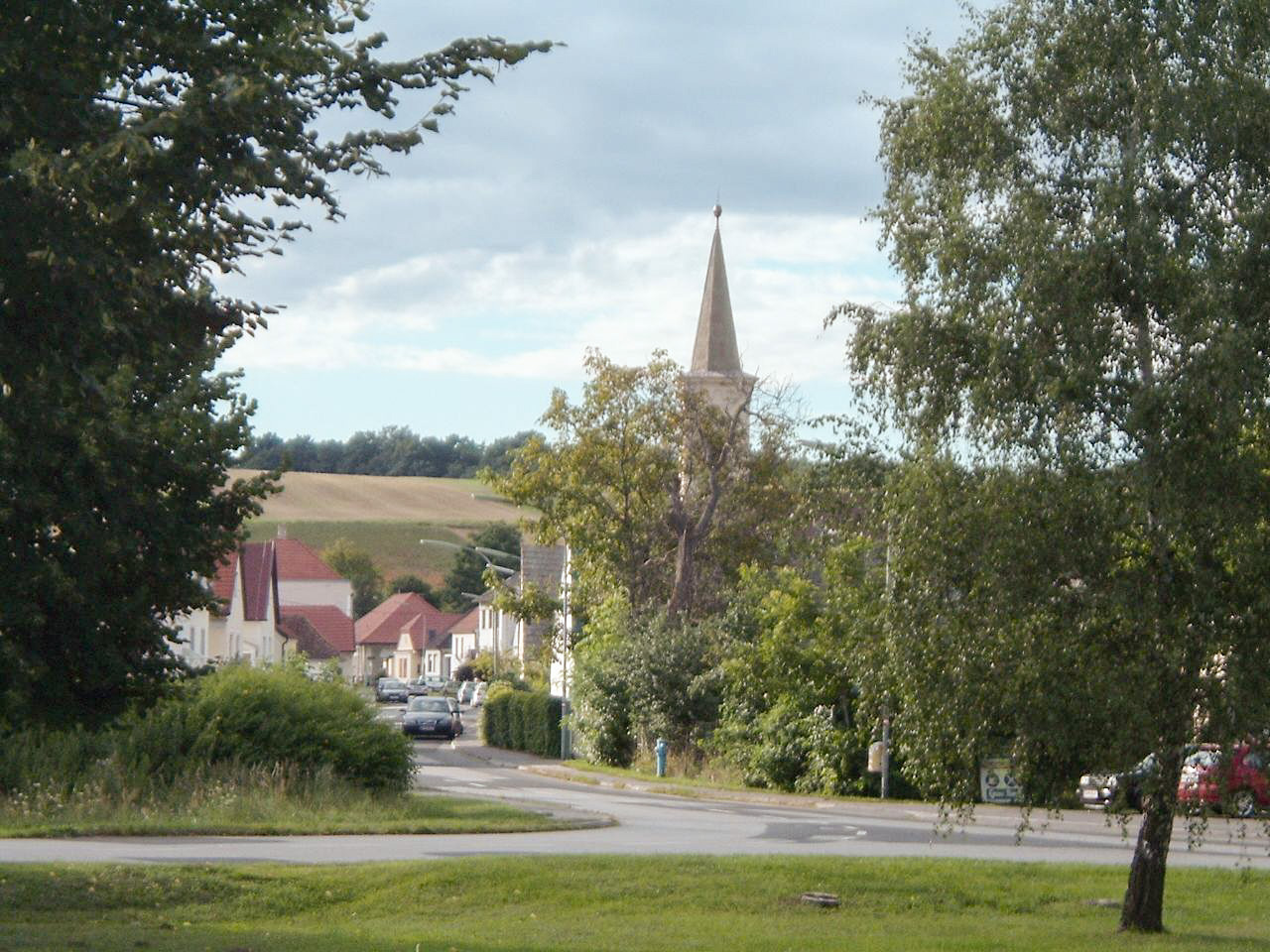 Liebing, Burgenland, Austria